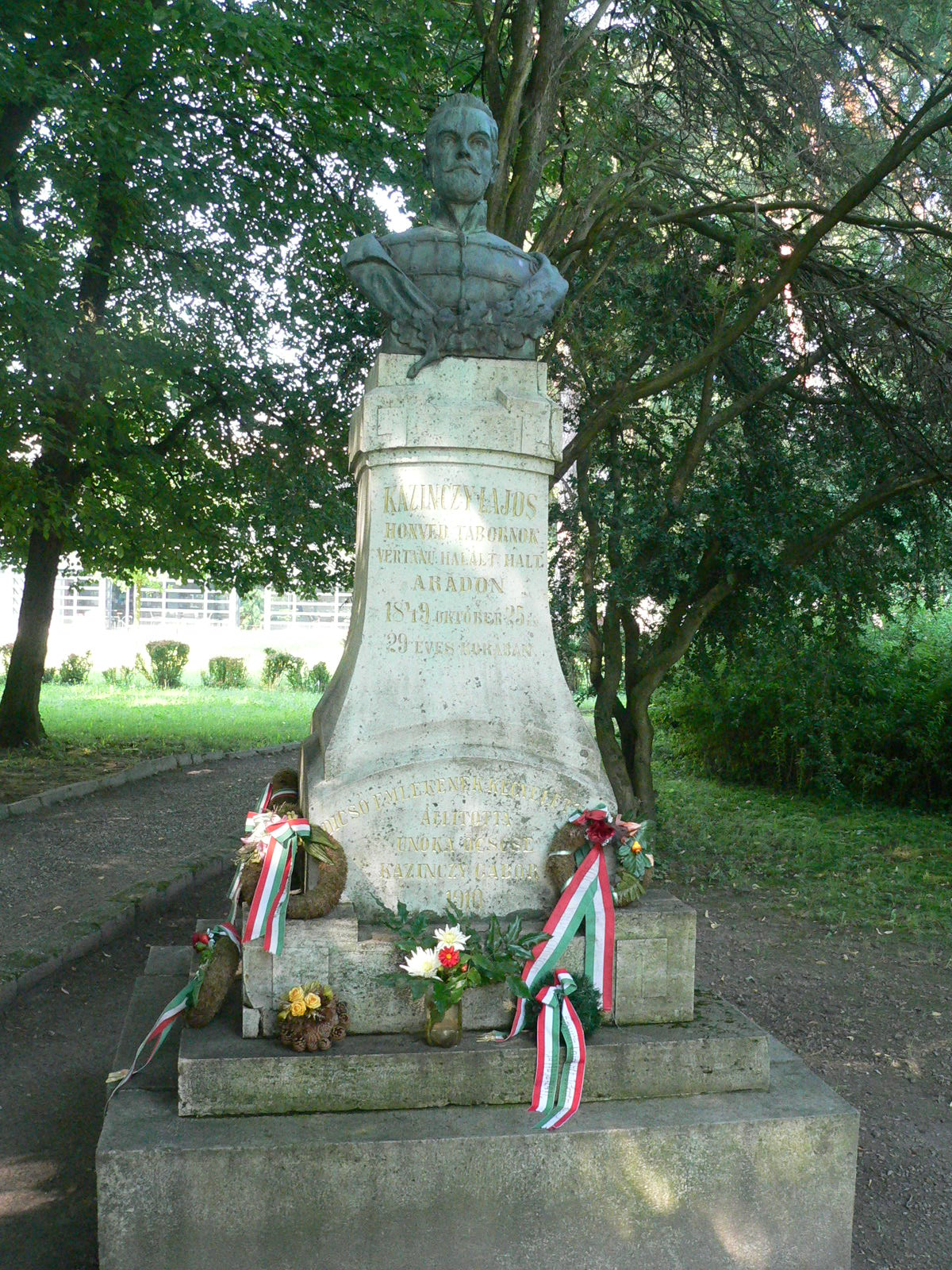 Tóth András: Kazinczy Lajos mellszobra (1911) a széphalmi emlékparkban, Sátoraljaújhely